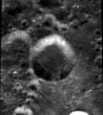 舍恩菲尔德陨石坑